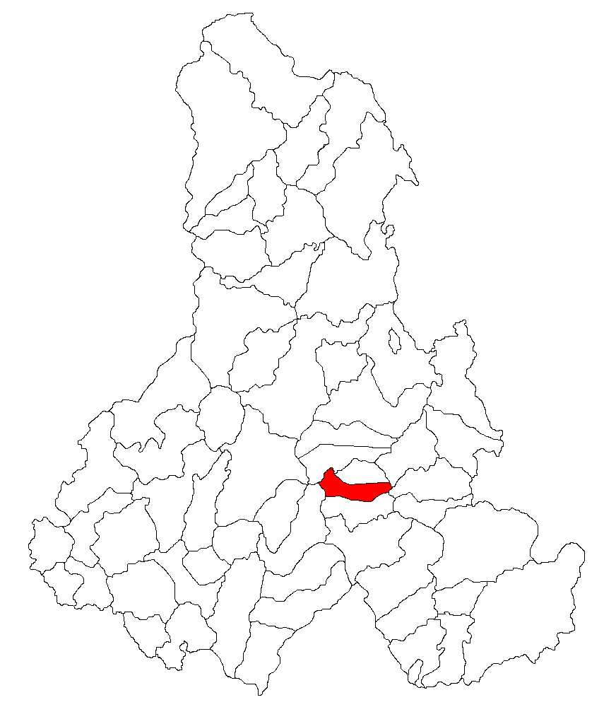 Sikuleni jud Harghita